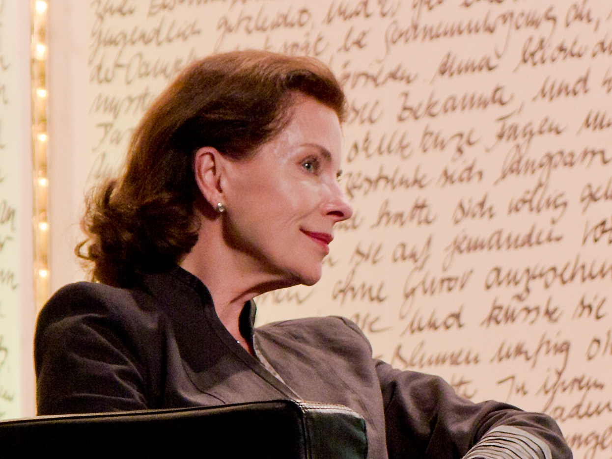 Gudrund Landgrebe (* 20. Juni 1950 in Göttingen), deutsche Schauspielerin.